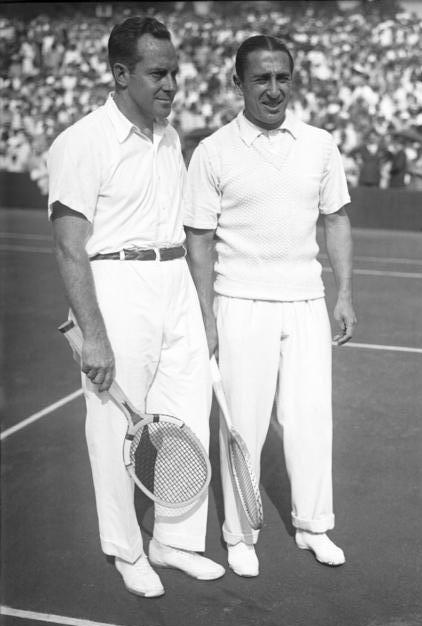 Zehntausende von Zuschauern beim Tenniskampf um den Davis-Pokal auf den rot-weiss-Plätzen in Berlin-Grunewald.! Der deutsche Tennismeisters Prenn (rechts) und der amerikanische Tennismeister (links) vor Ihrem entscheidenden Spiel um den Davis-Pokal.